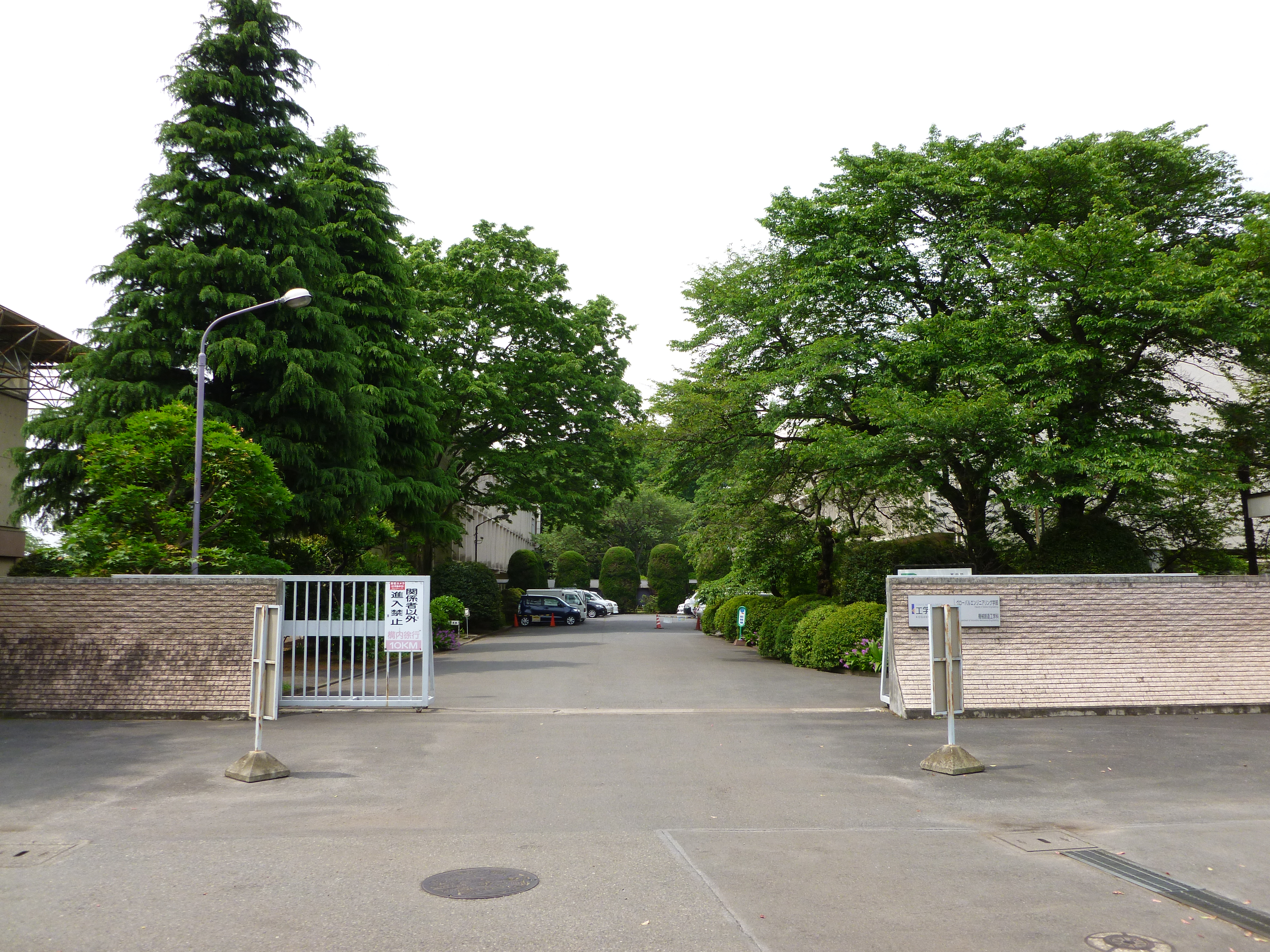 Entrée du campus de Kogakuin university (Inume)